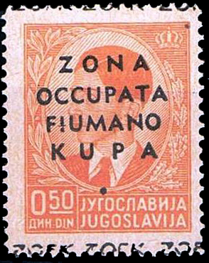 Почтовая марка Фиуме-Купа, надпечатка на марке Югославии 1939 года Italian occupation of Yugoslav Fiume-Kupa(on the outskirts of Fiume). Yugoslav stamp overprinted "Zona Occupata Fiumano Kupa" (Fiume Kupa Occupied Zone)